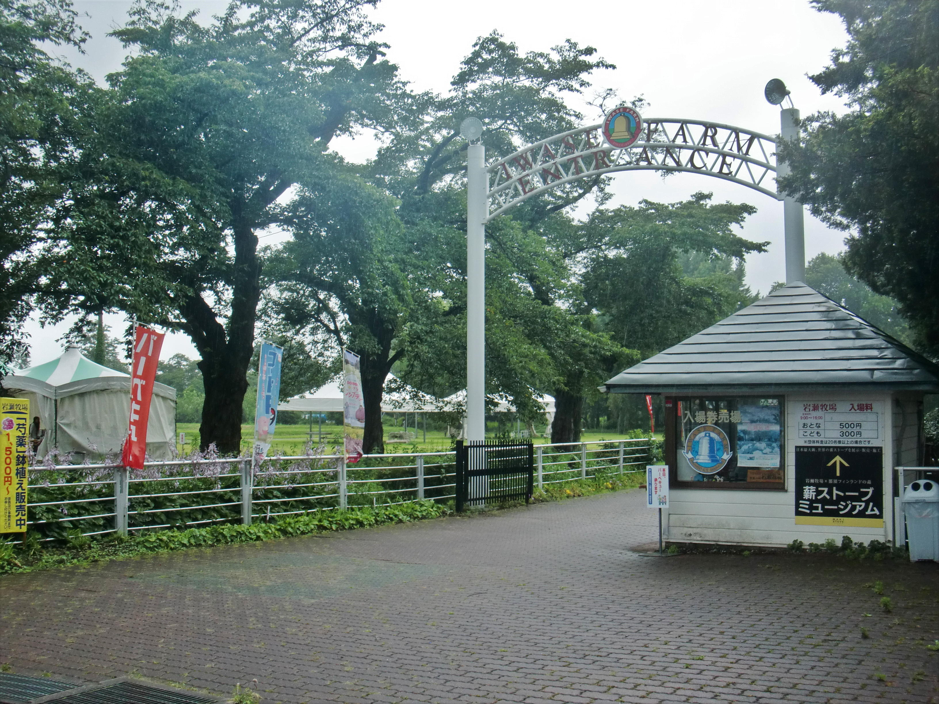 福島県須賀川市/鏡石町 岩瀬牧場入口